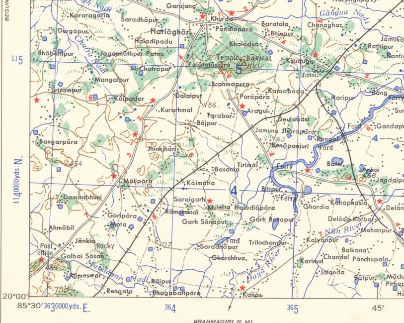 Golbai Sason village